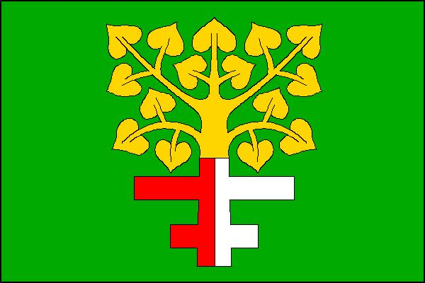 Vlajka obce Braníškov